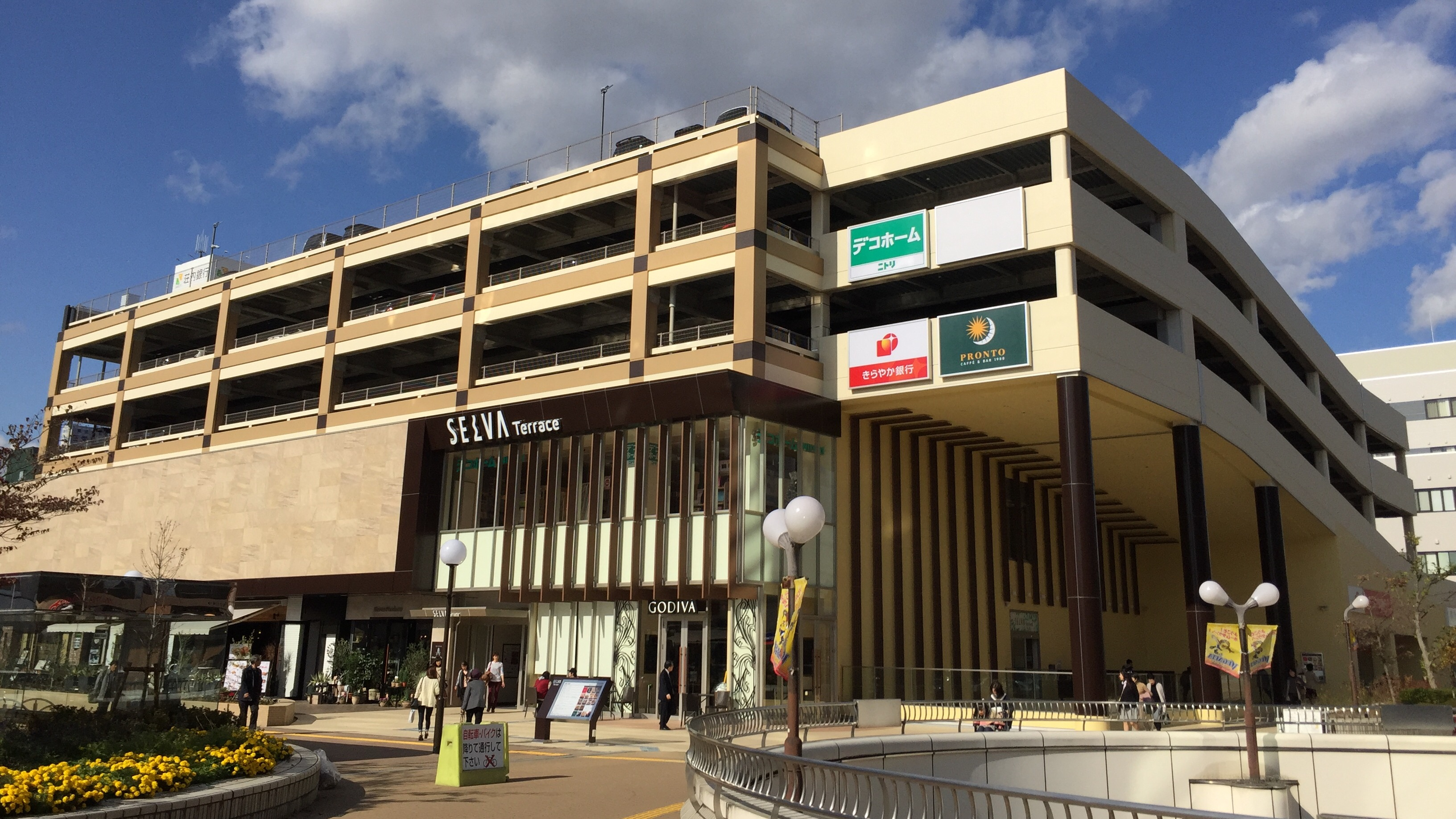 仙台市泉区にある商業施設「セルバテラス」